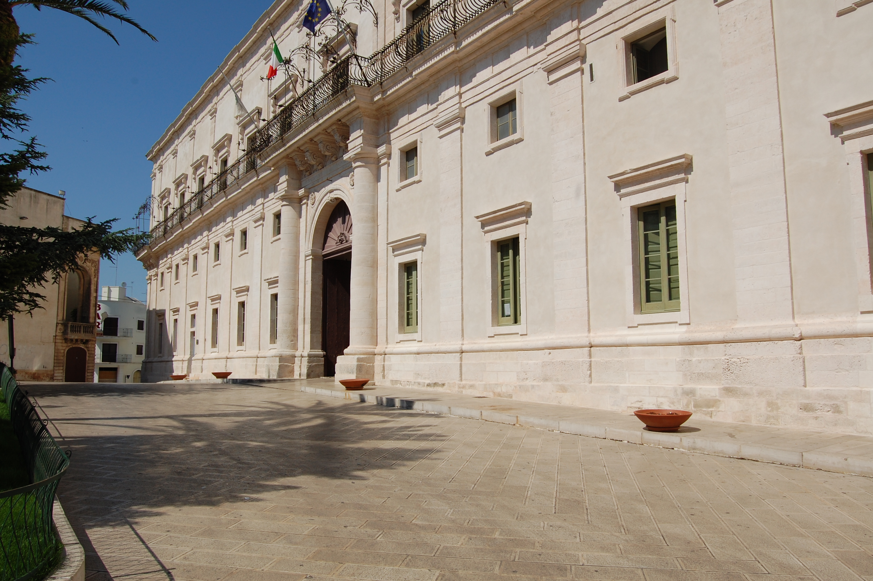 Il portale evidenziato da due maestose semicolonne.